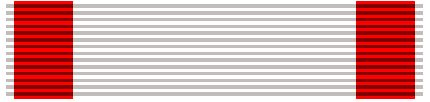 旭日章の略綬